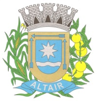 Brasão da cidade de Altair, SP